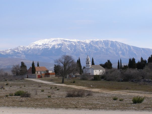 Pravoslavna crkva svetog Nikole u Vrbniku, u općini Biskupija.